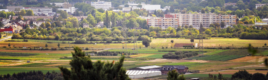 Messdorfer Feld Grünes C